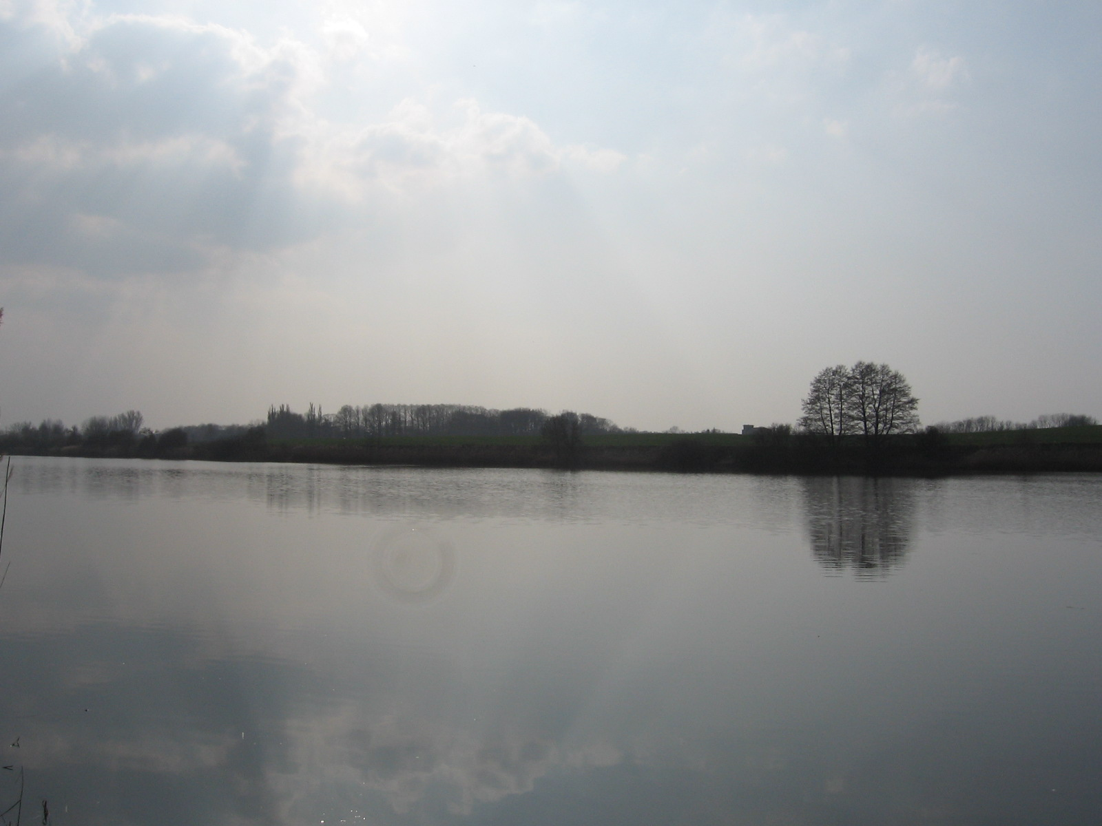 Lebehnscher See im Landkreis Uecker-Randow, Mecklenburg-Vorpommern